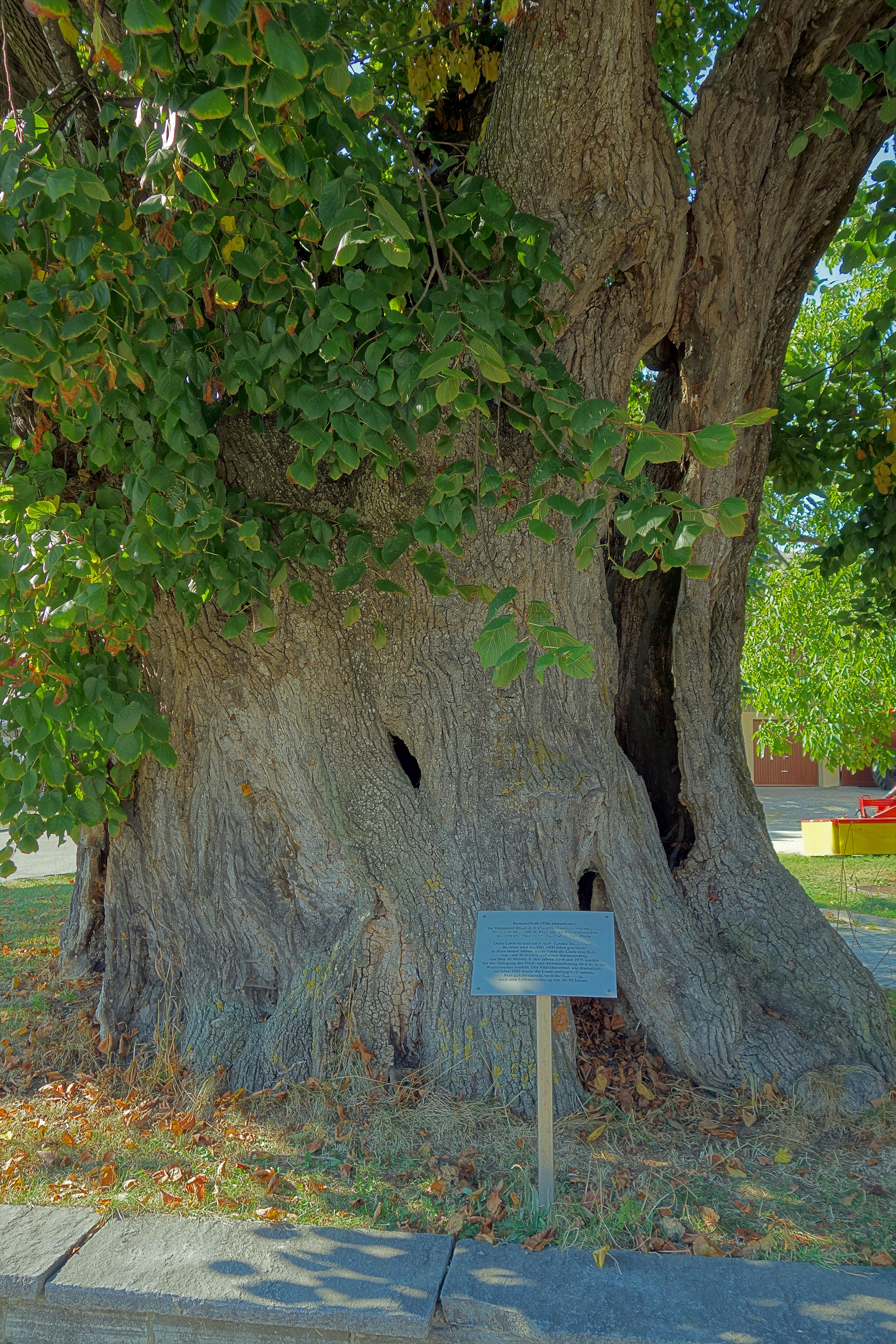 Linde Hohenbodman